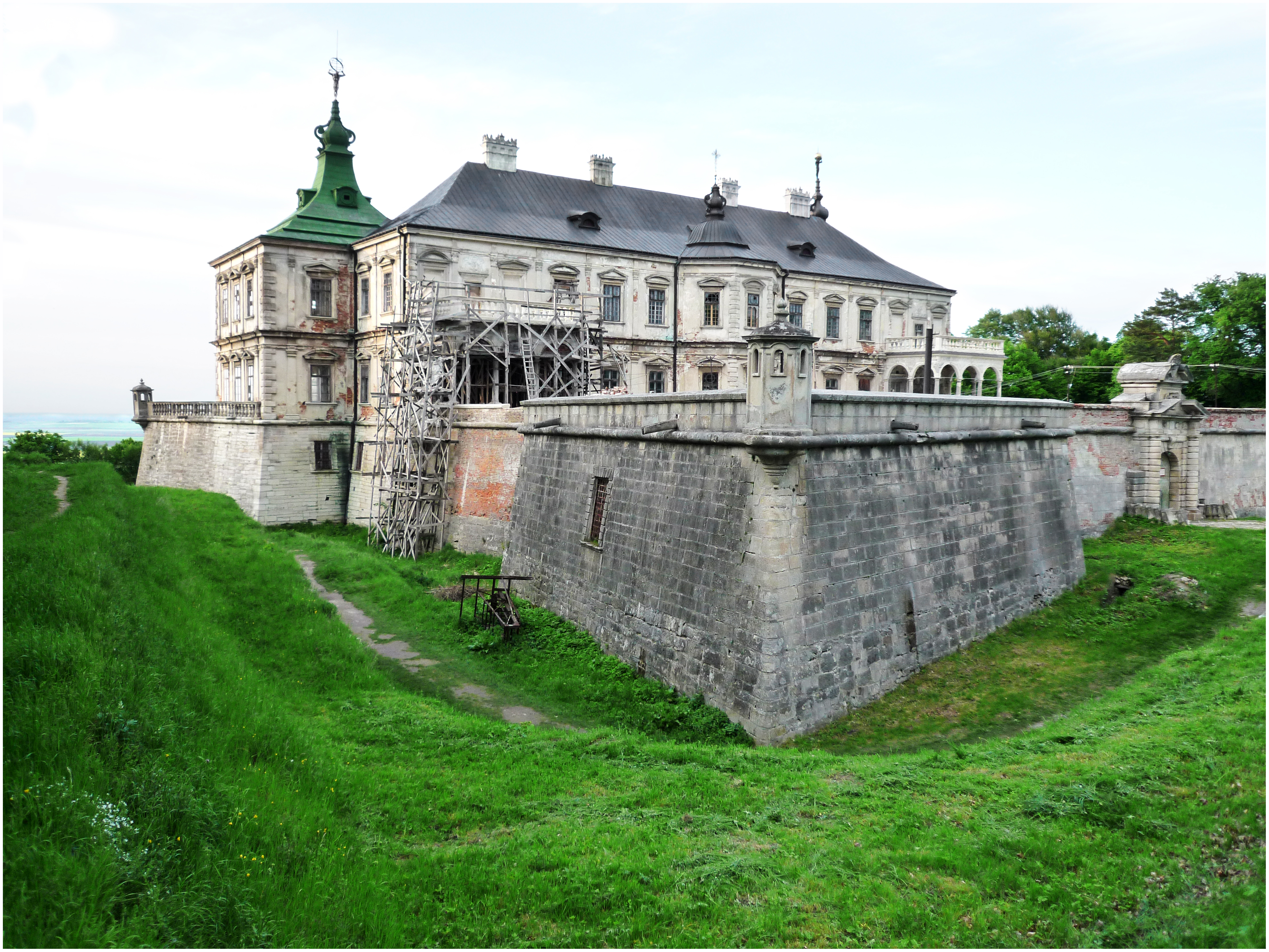 Замок Конецпольських (мур.), Підгірці